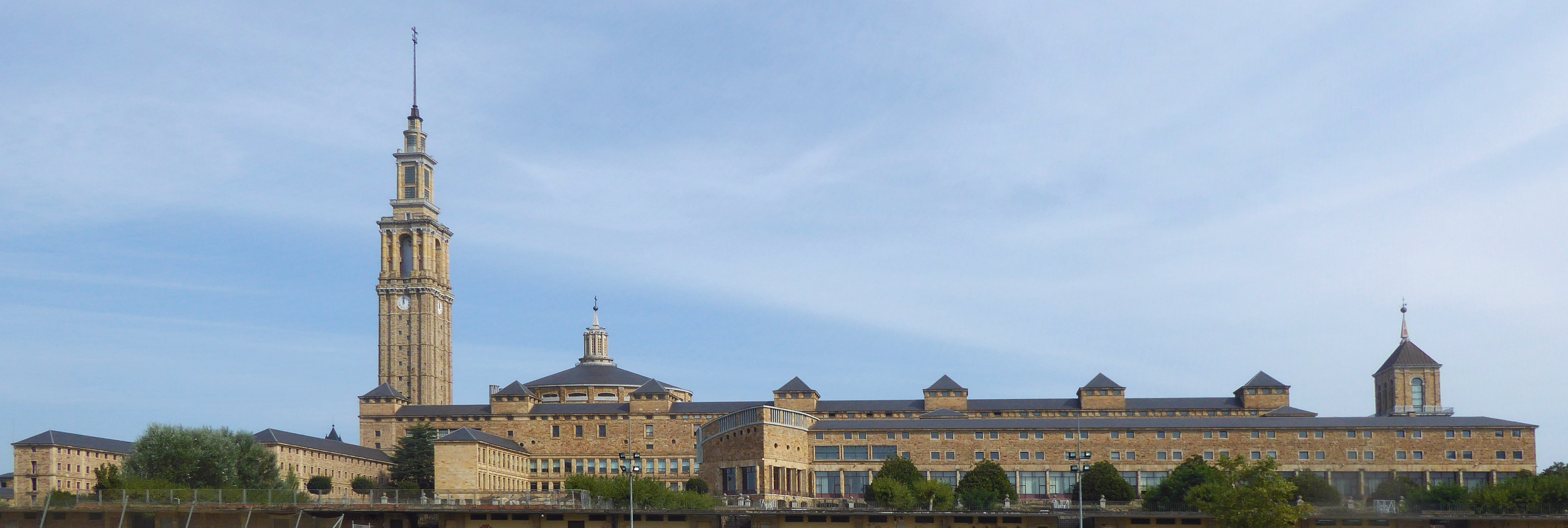 Universidad Laboral de Gijón (1946-1956), ein Monumentalbau aus der Franco-Zeit für die Universität von Gijon Asturien Spanien - Foto Wolfgang Pehlemann P1060132